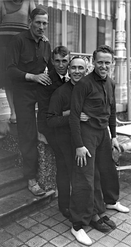 Bei den deutschen Olympia-Teilnehmern in Zandvoort / Holland! Die deutsche Leichtathleten in ihrem Trainingsquartier in Zandvoort v.re.n.li.: Corts, Houben, Dr. Wichmann und Hofmeister, die deutschen Meister im Kurzstreckenlauf.